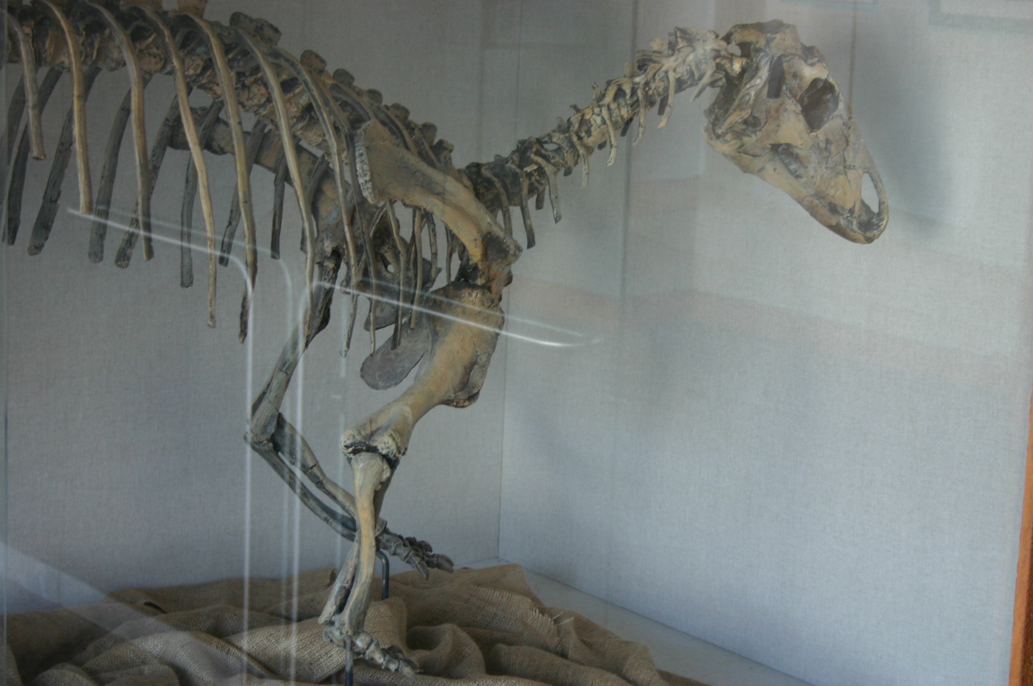 Visit my blog at